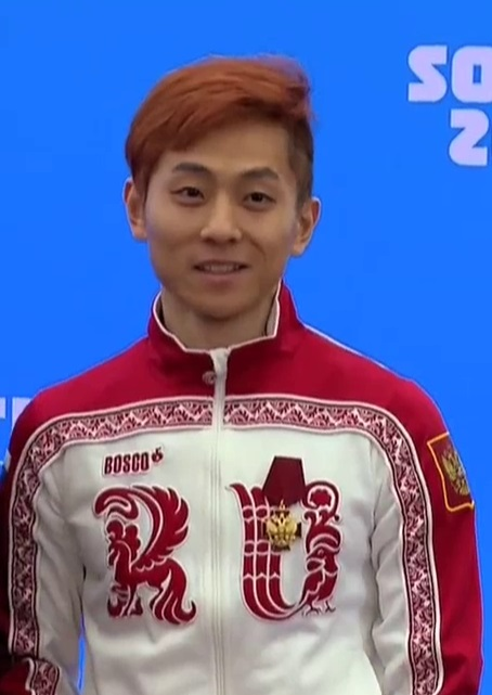 Виктор Ан